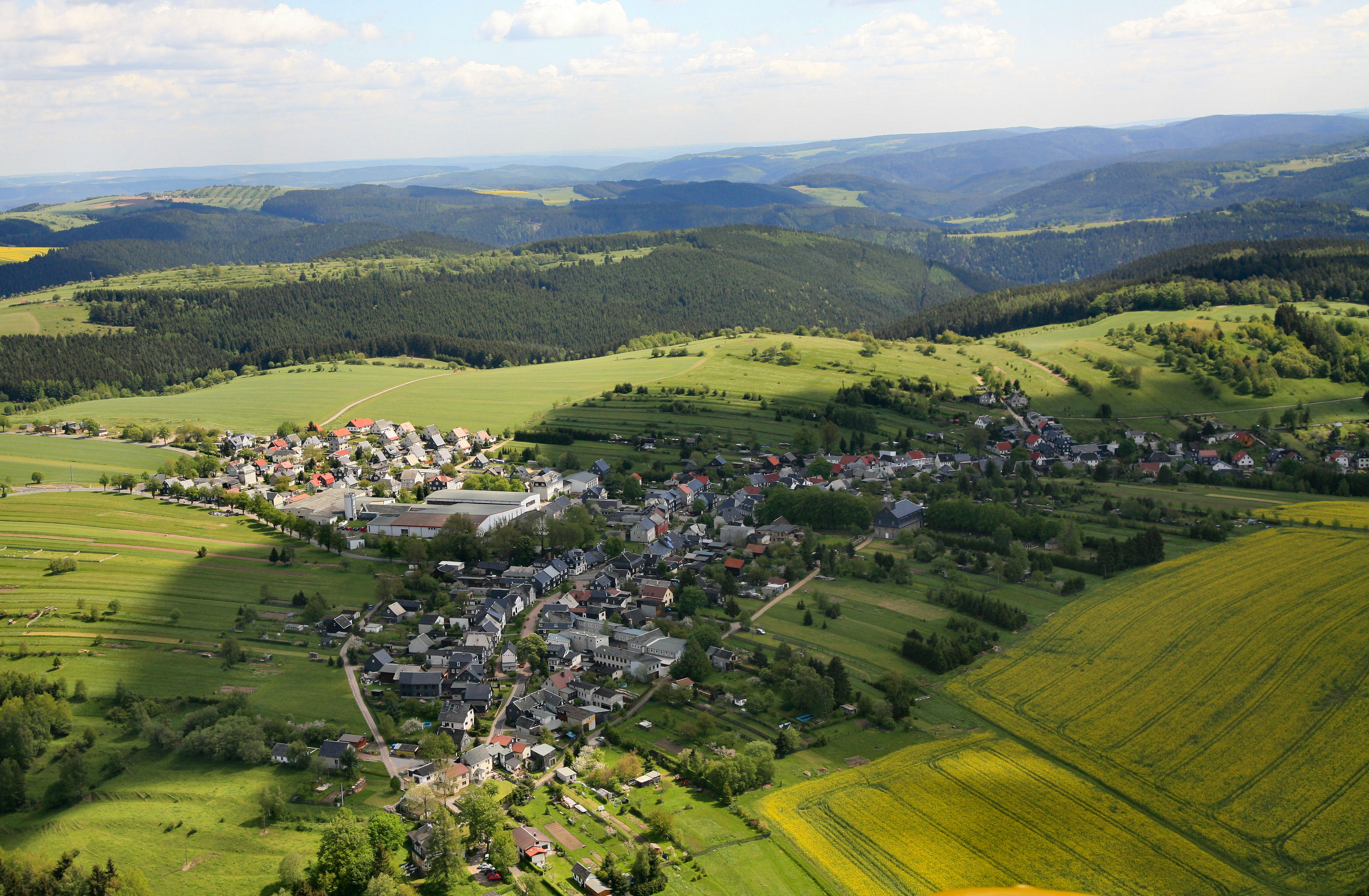 Blick über Böhlen aus Westen